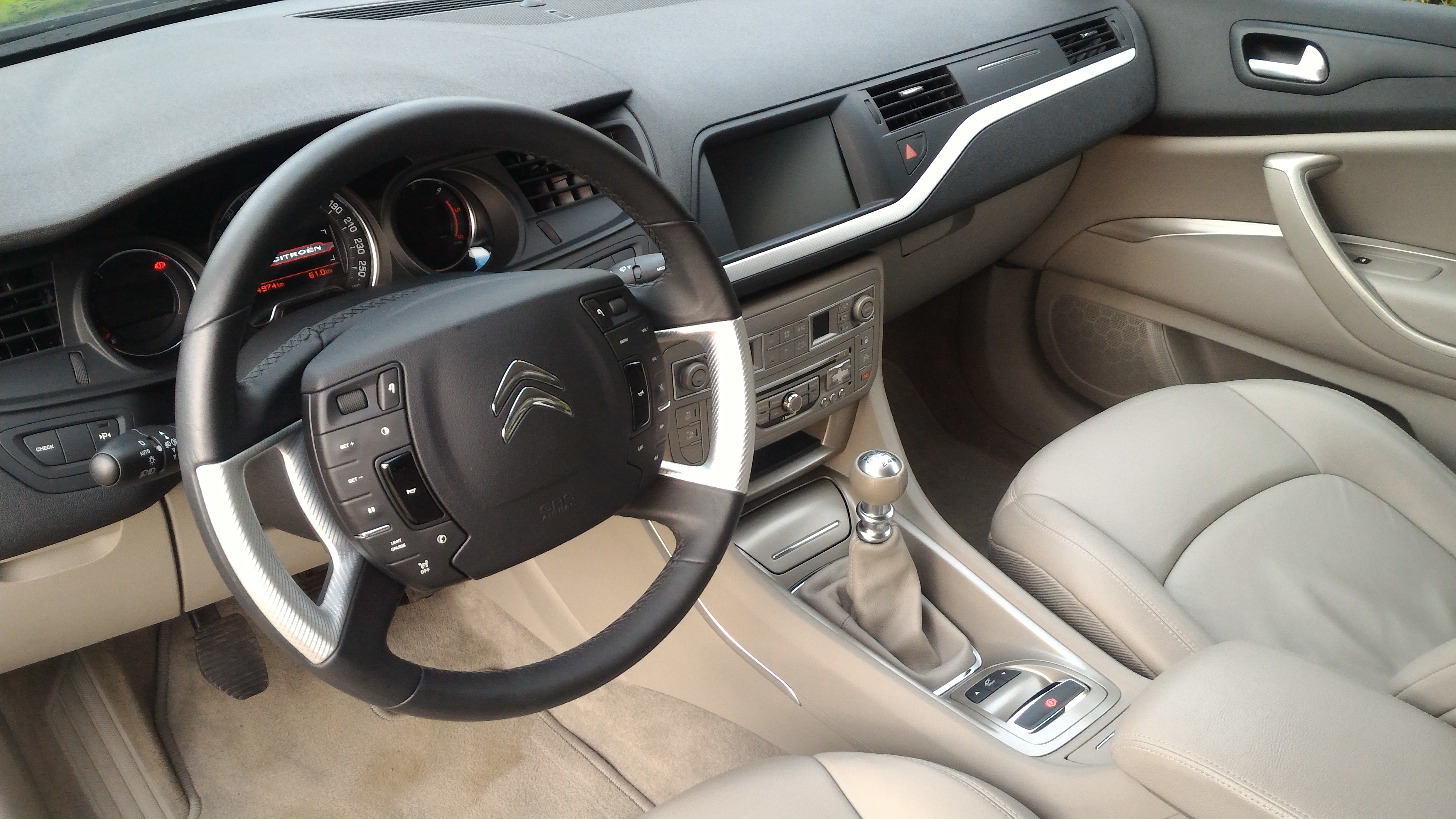 C5 HDI 160